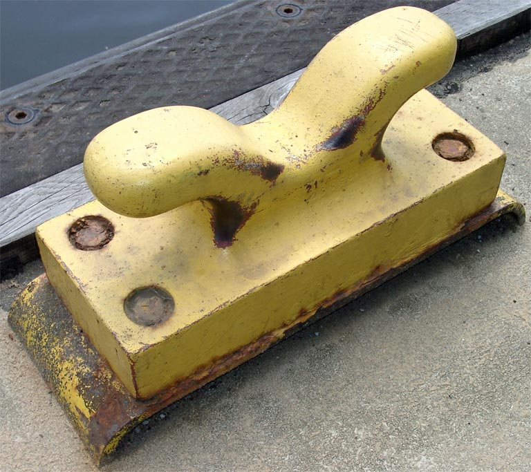 Klampe